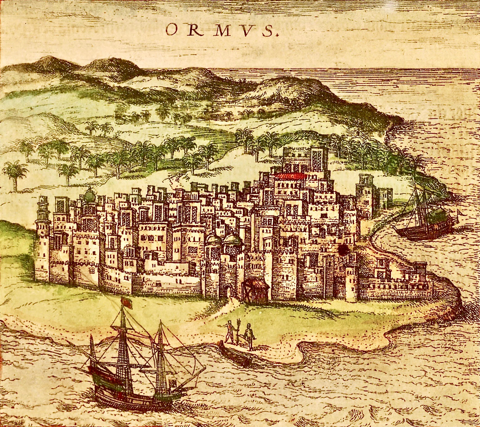 Die Meerenge am Eingang zum Persischen Golf, an der Hormus auf der gleichnamigen Insel liegt, war im Zeitalter der Segelschifffahrt im Indischen Ozean von nicht geringerer strategischer Bedeutung als heute. Die Stadt kontrollierte den Verkehr zwischen den Häfen am Gof und dem Osten. Aus Georg Braun, Frans Hogenberg: Civitates orbis terrarum, 1572 ff. © Hebräische Universität Jerusalem & Israelische Nationalbibliothek.